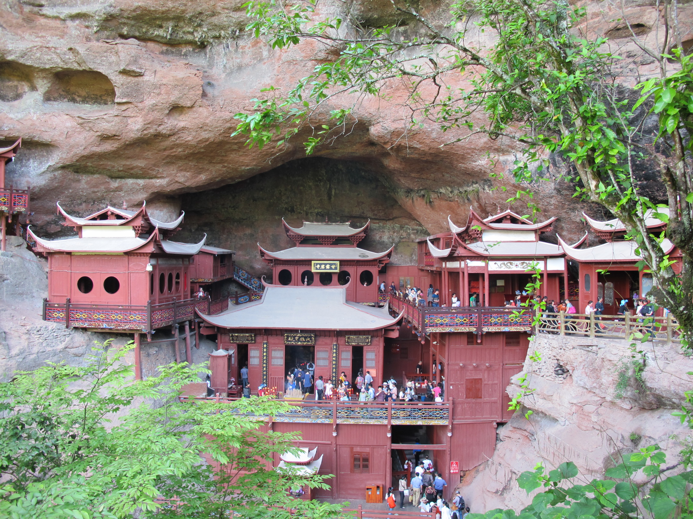 大金湖甘露寺